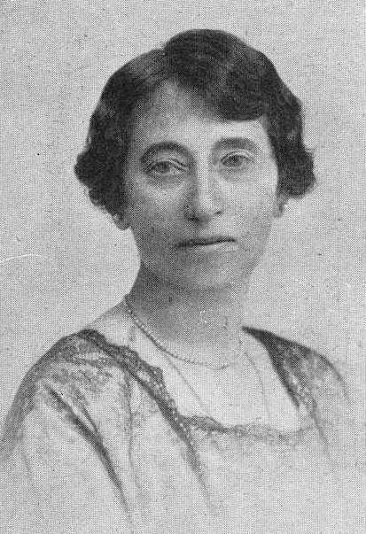 Francisca Herrera Garrido, fotografía en Vida Gallega 1926